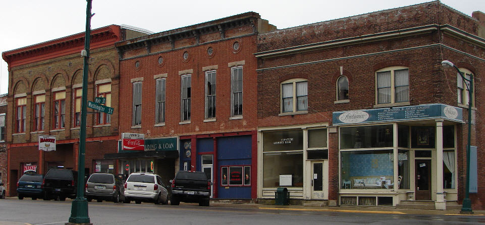 Ladoga, Indiana